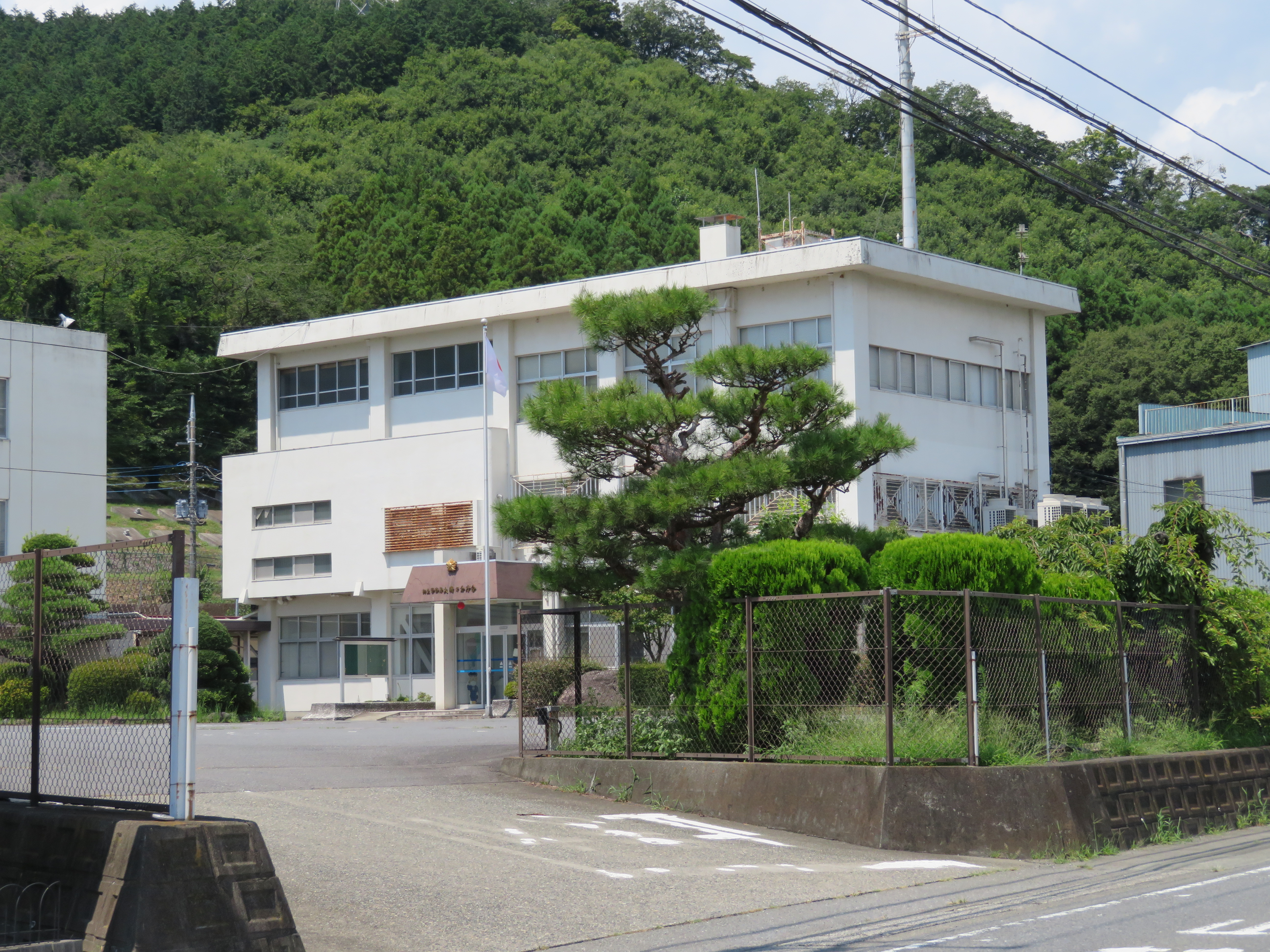 桐生警察署大間々分庁舎（旧大間々警察署庁舎） Canon PowerShot SX720 HS